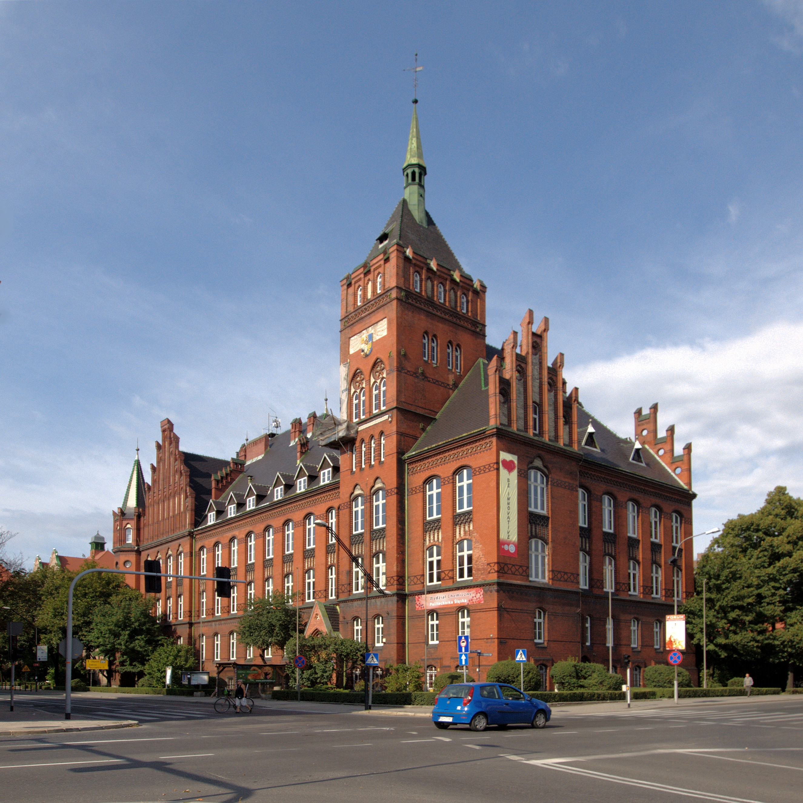 Politechnika Śląska - Wydział Chemiczny, tzw. Czerwona Chemia. Widok z rogu Akademickiej i Wrocławskiej.